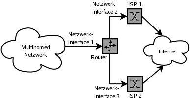 Netzwerkdiagramm - Beispiel eines Multihomed Netzwerkes